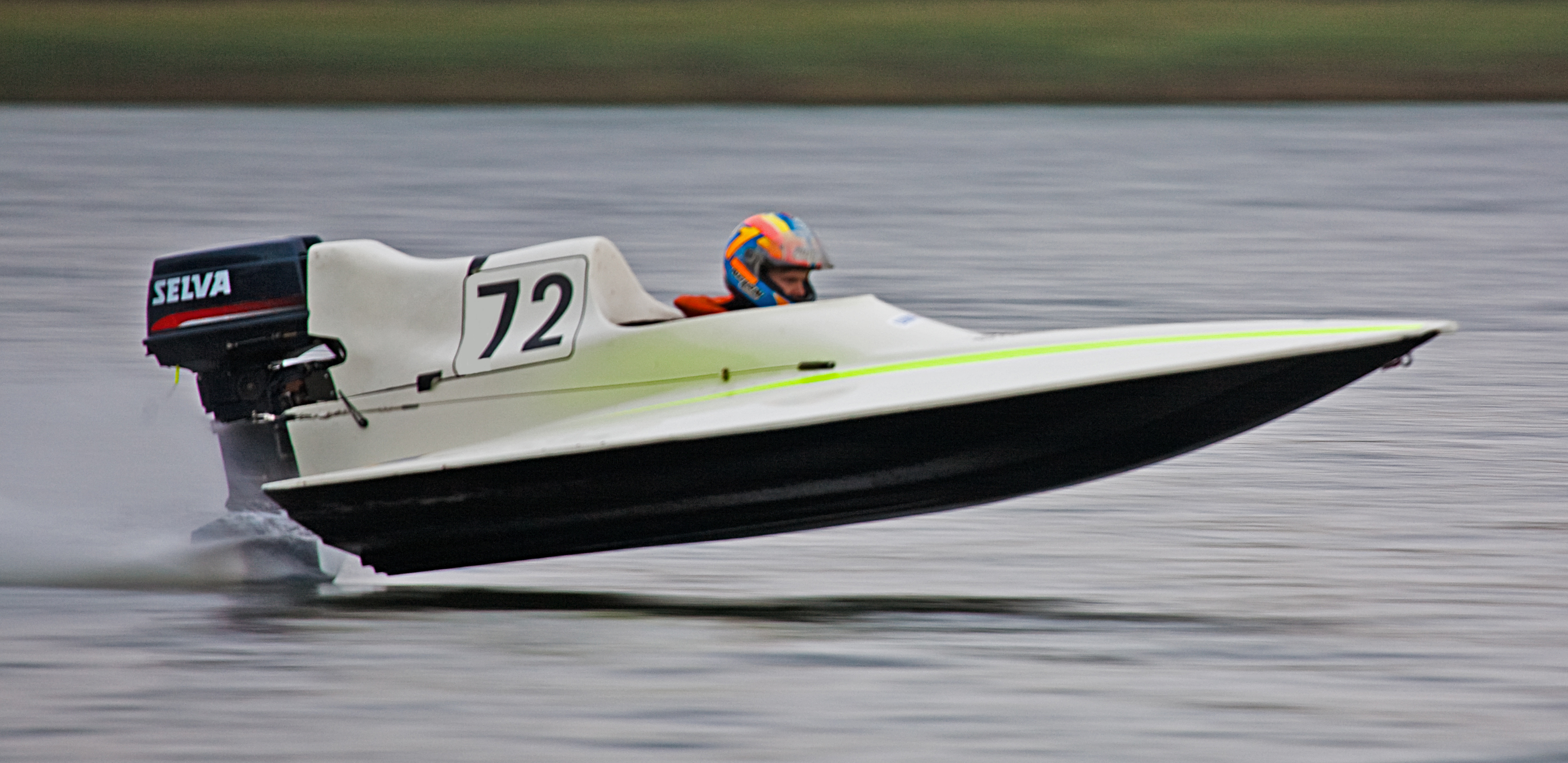 Vaxholmsloppet 2010